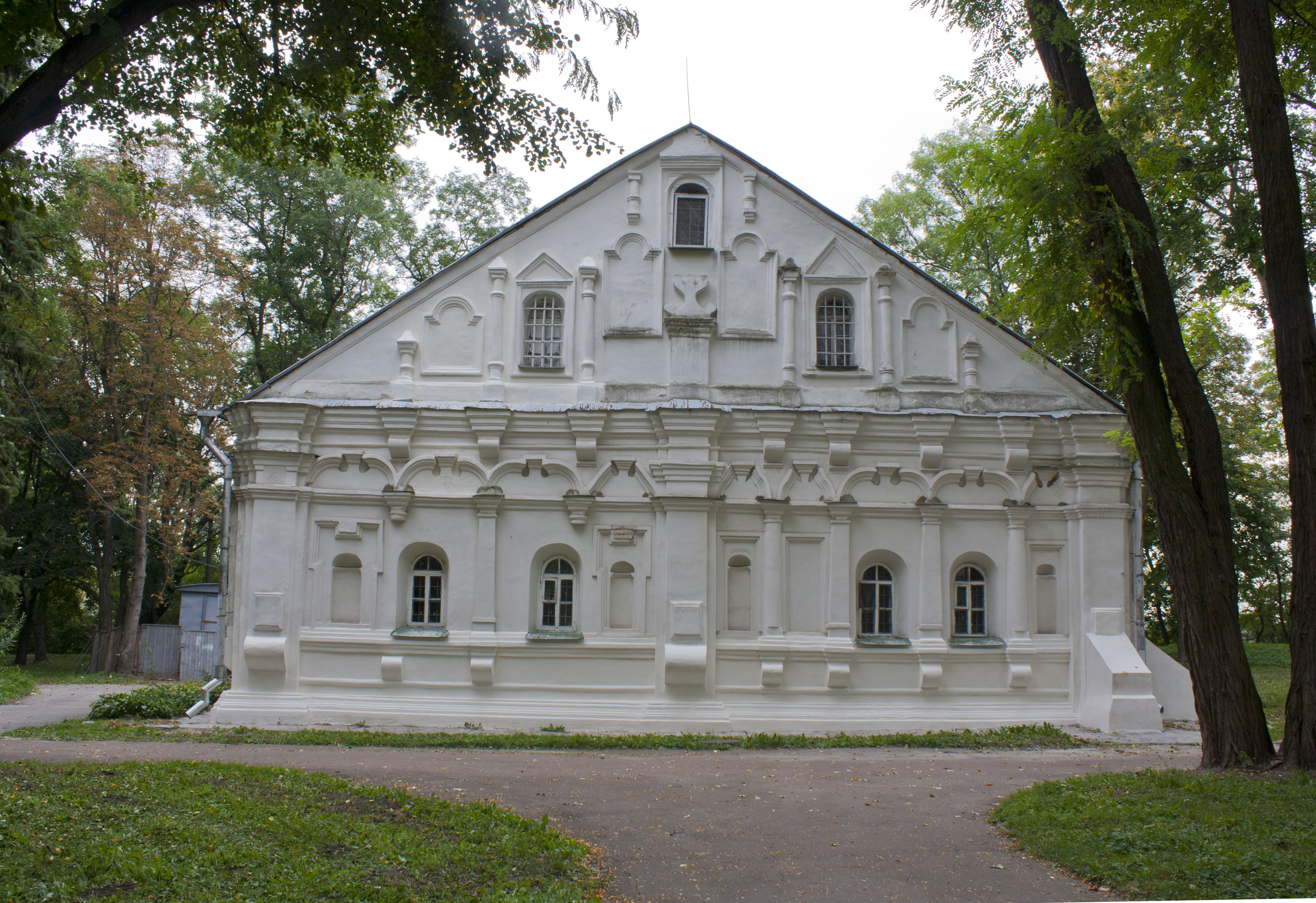 м. Чернігів, Вал, Будинок полкової канцелярiї, вересень 2012 року, західна сторона.